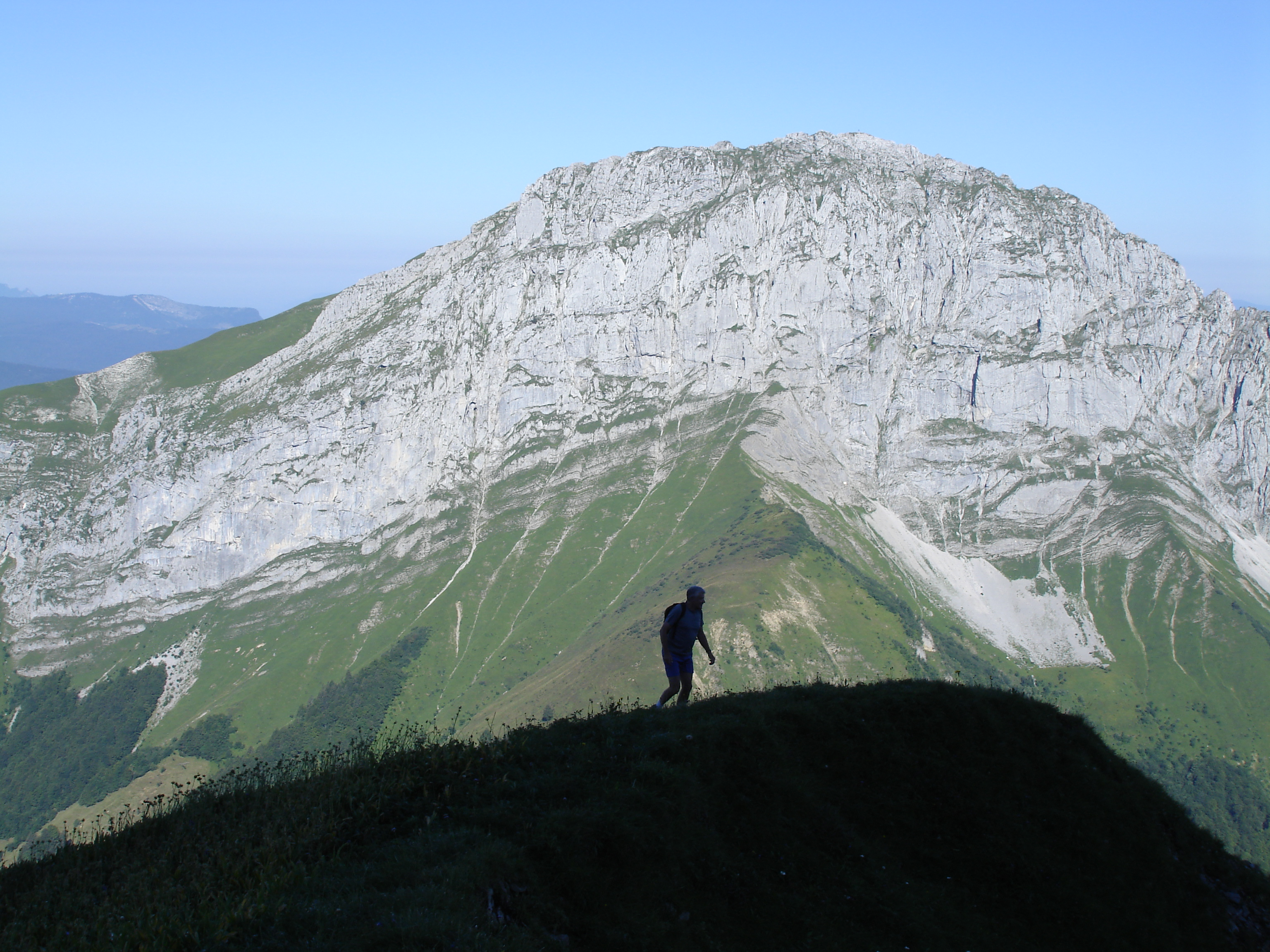 Face Est du Trélod 2181m